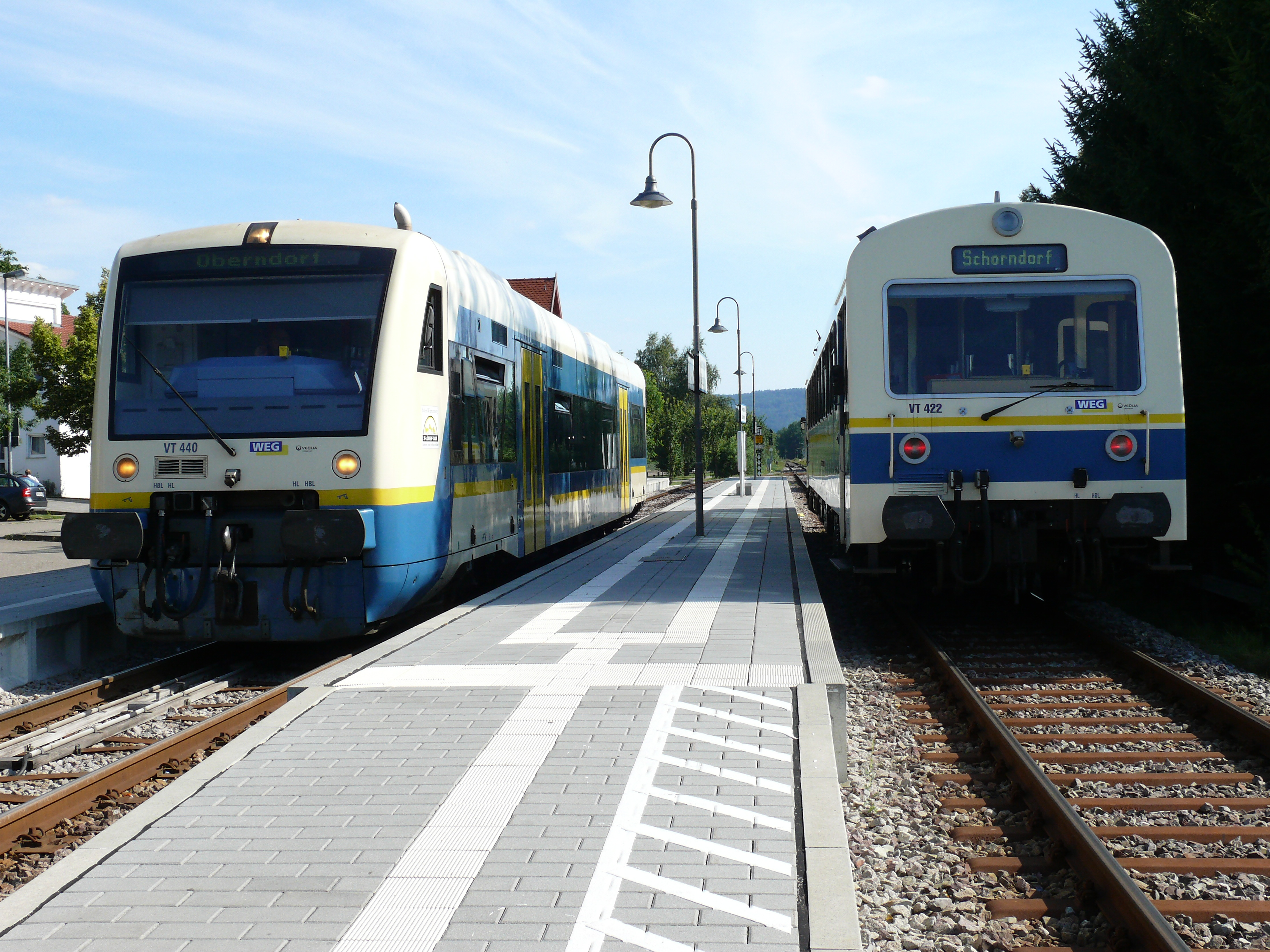 Ein RS1- und ein NE 81-Triebwagen begegnen sich im Bahnhof Miedelsbach-Steinenberg an der Wieslauftalbahn.